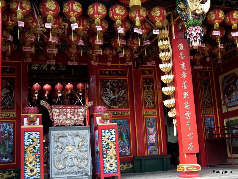 Tien Kok Sie Temple of Surakarta